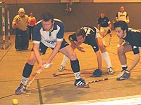 Spielszene 2.Bundesliga Spiel Eintracht Dortmund - SW Köln Saison 05/06